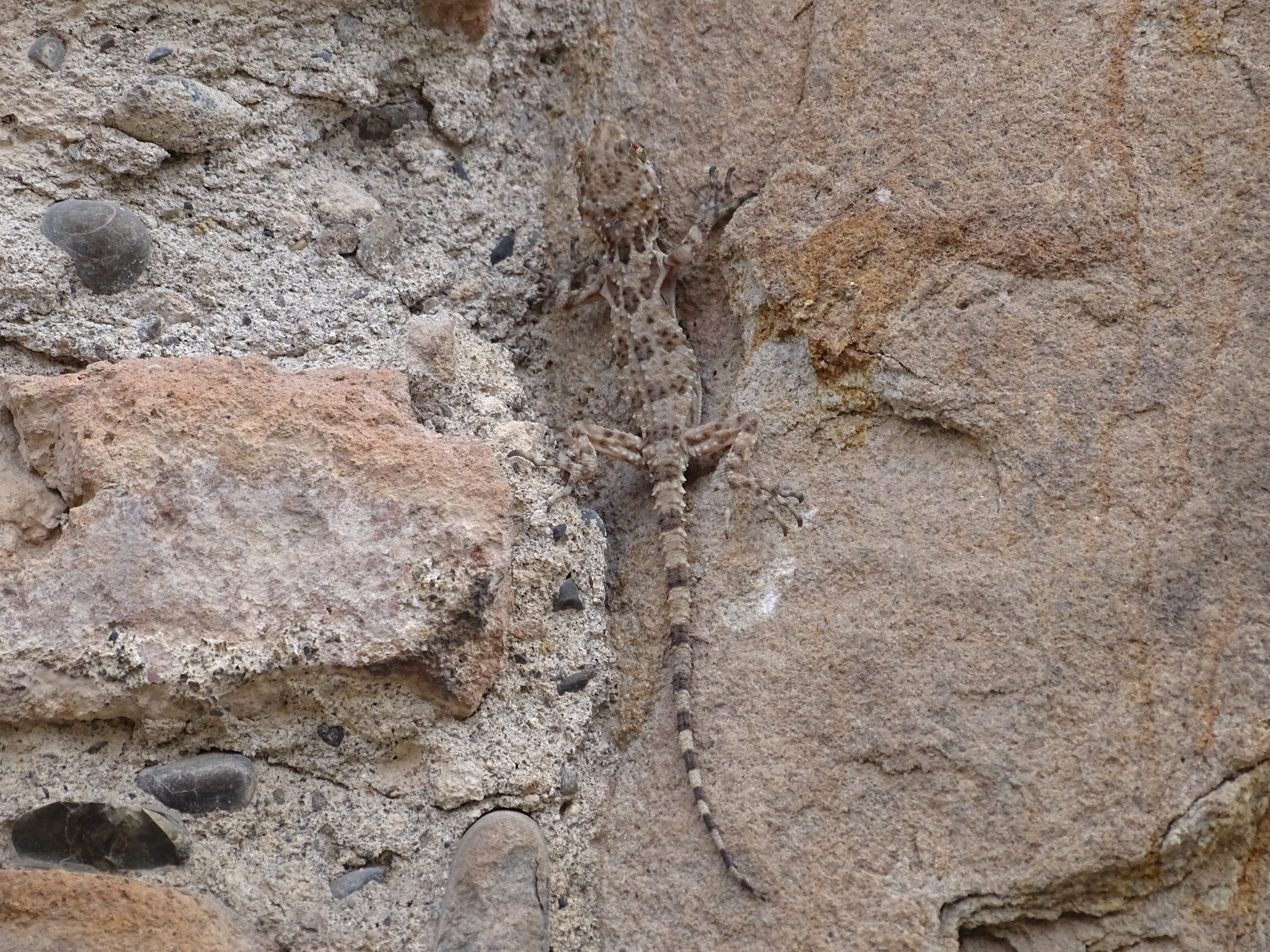 Gecko Tenuidactylus caspius, Syn. Cyrtopodion caspium